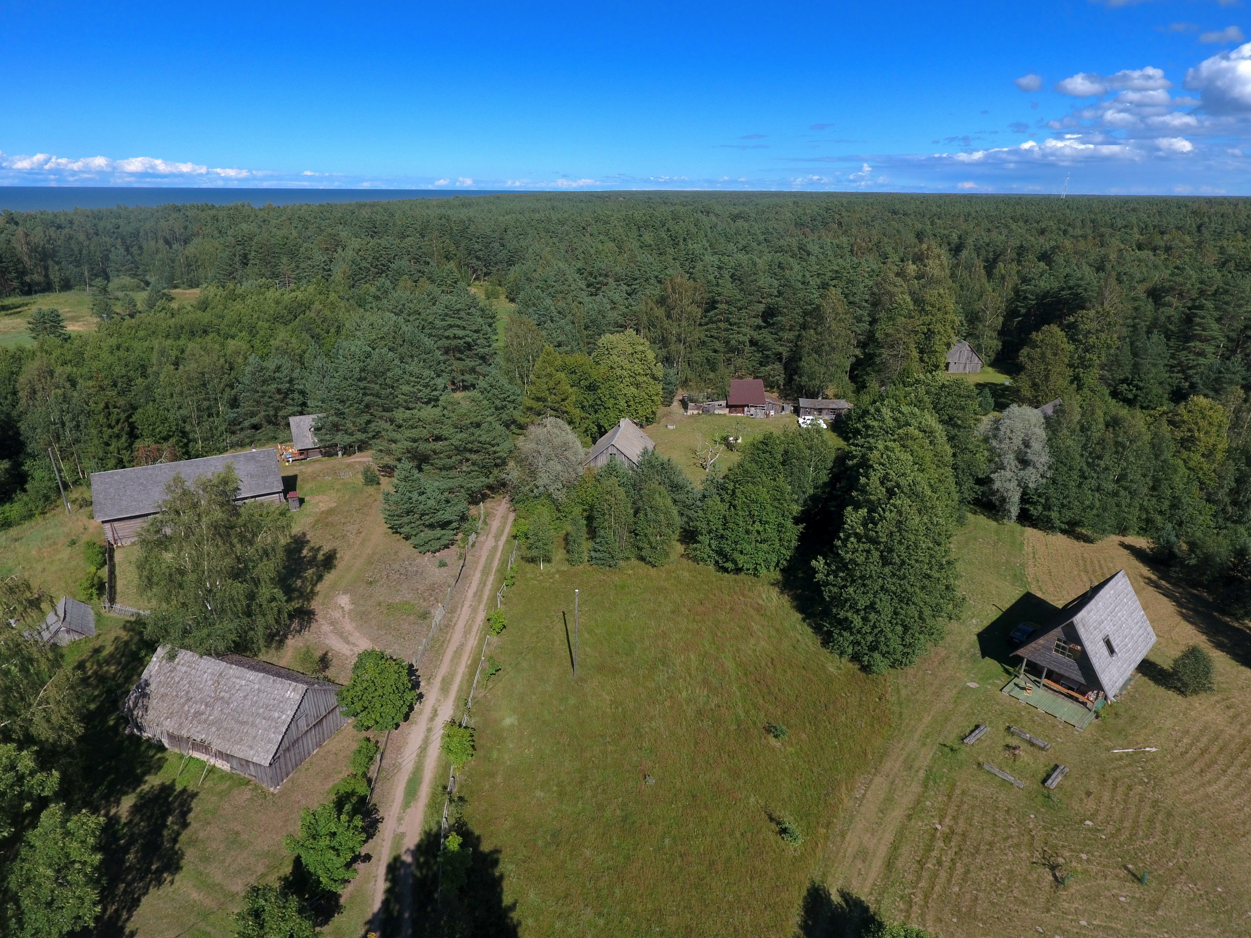 Košraga zvejnieku ciems, Kolkas pagasts